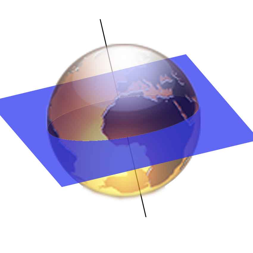 Summary Illustration de la rotation de la terre, à partir de l'image Image:Exquisite-opera.png sur Wikipedia en domaine public. Jean-Luc W 26 avril 2006 à 16:30 (CEST) Licensing